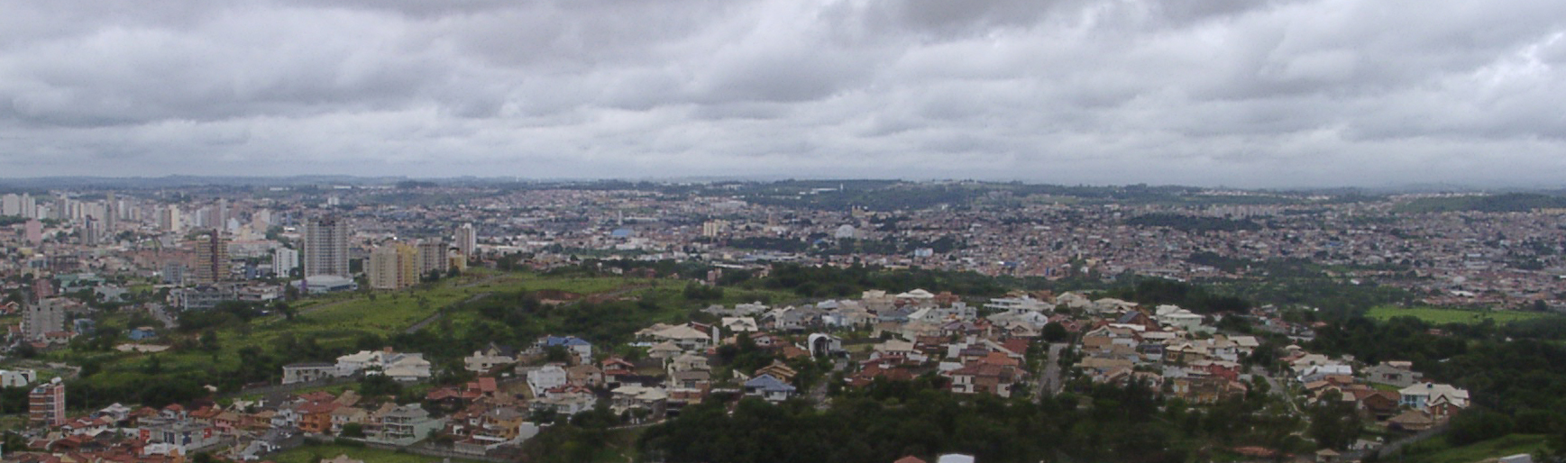 Vista de parte de Sorocaba num dia nublado, tirada enquanto estava hospedada no Transamerica Flat Hotel . Panorama of a part of Sorocaba in a cloudy day, taken while hosted at Transamerica Flat Hotel.